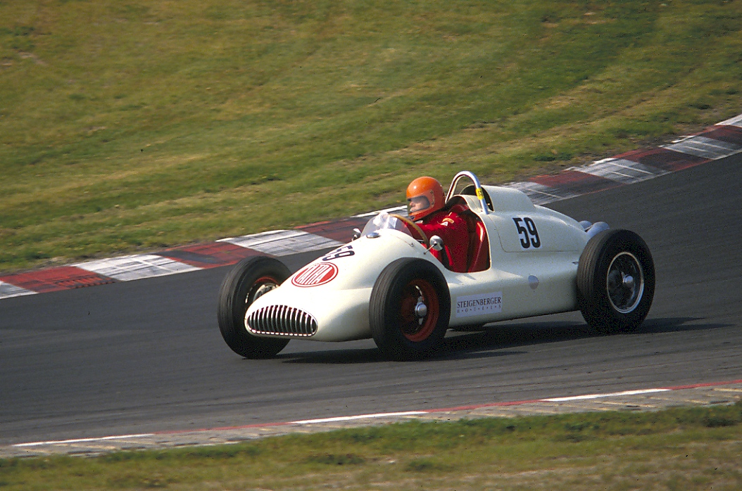 Tatra 607, Baujahr 1950, 2500 cm³ beim Oldtimer-Grand-Prix des AvD auf dem Nürburgring